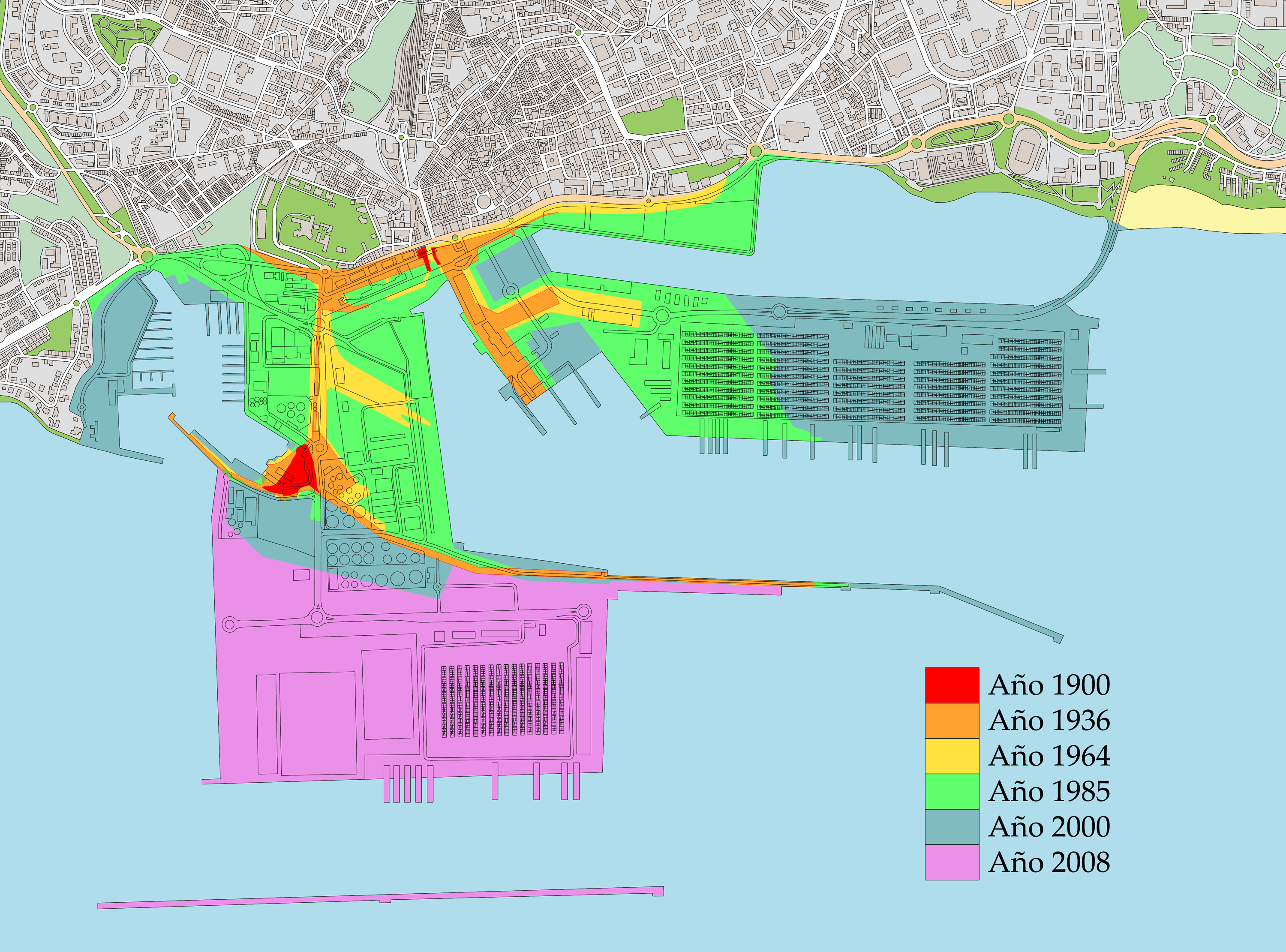 Plano indicativo de la evolución del Puerto de Algeciras, España, a lo largo de los años 1900, 1936, 1964, 1985, 2000, 2008 y 2012.